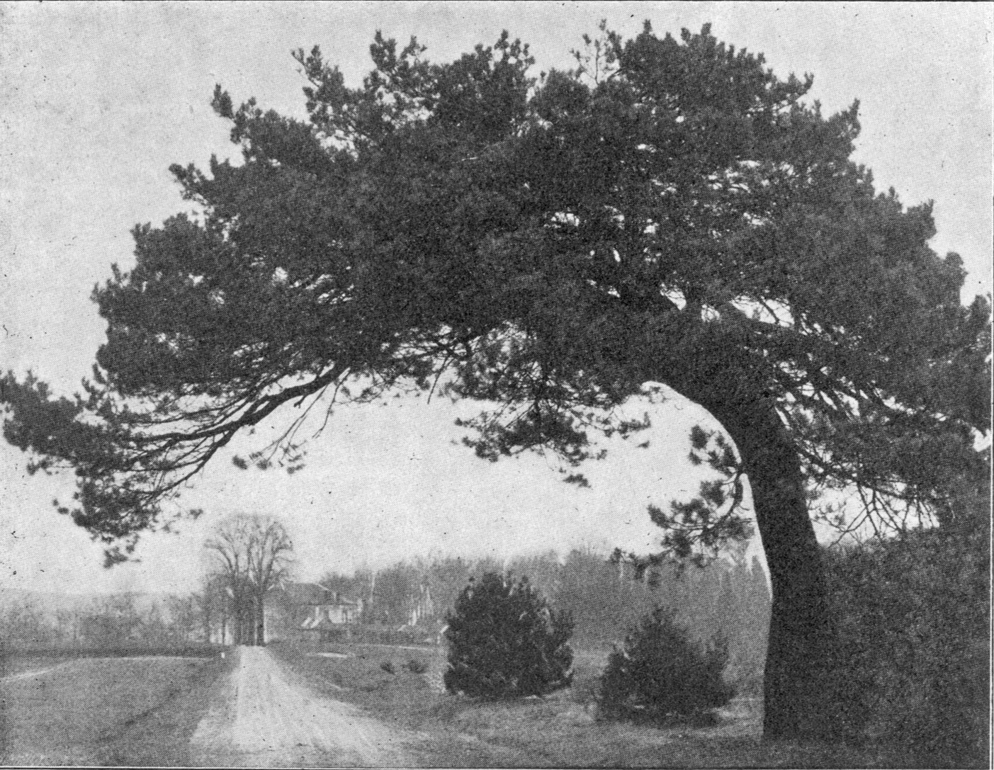 D'Kifer um Briddel virun zirka 100 Joer (Faber 1915)